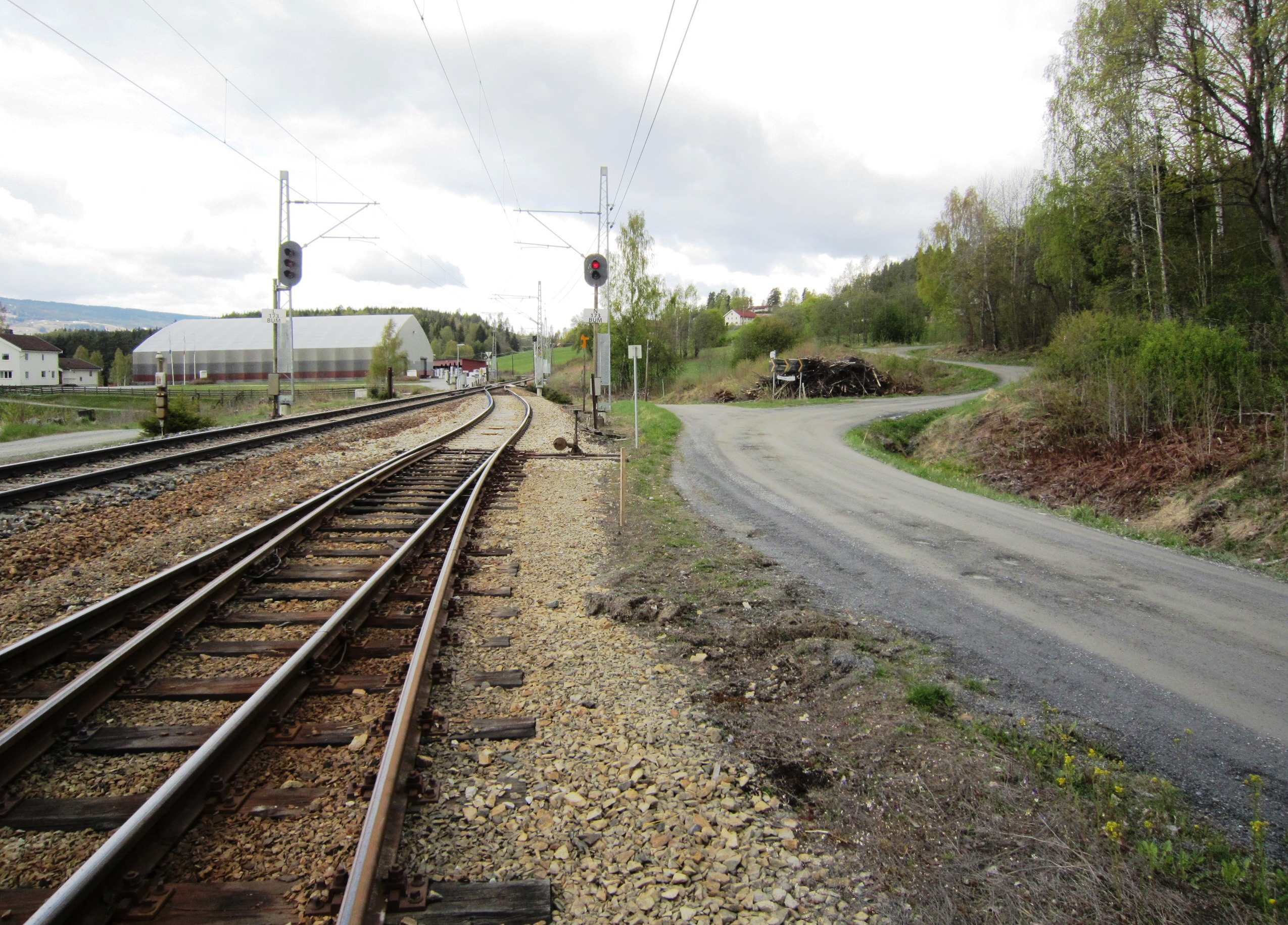 Fylkesvei 1654 (tidl. 1) like nord for Brøttum stasjon